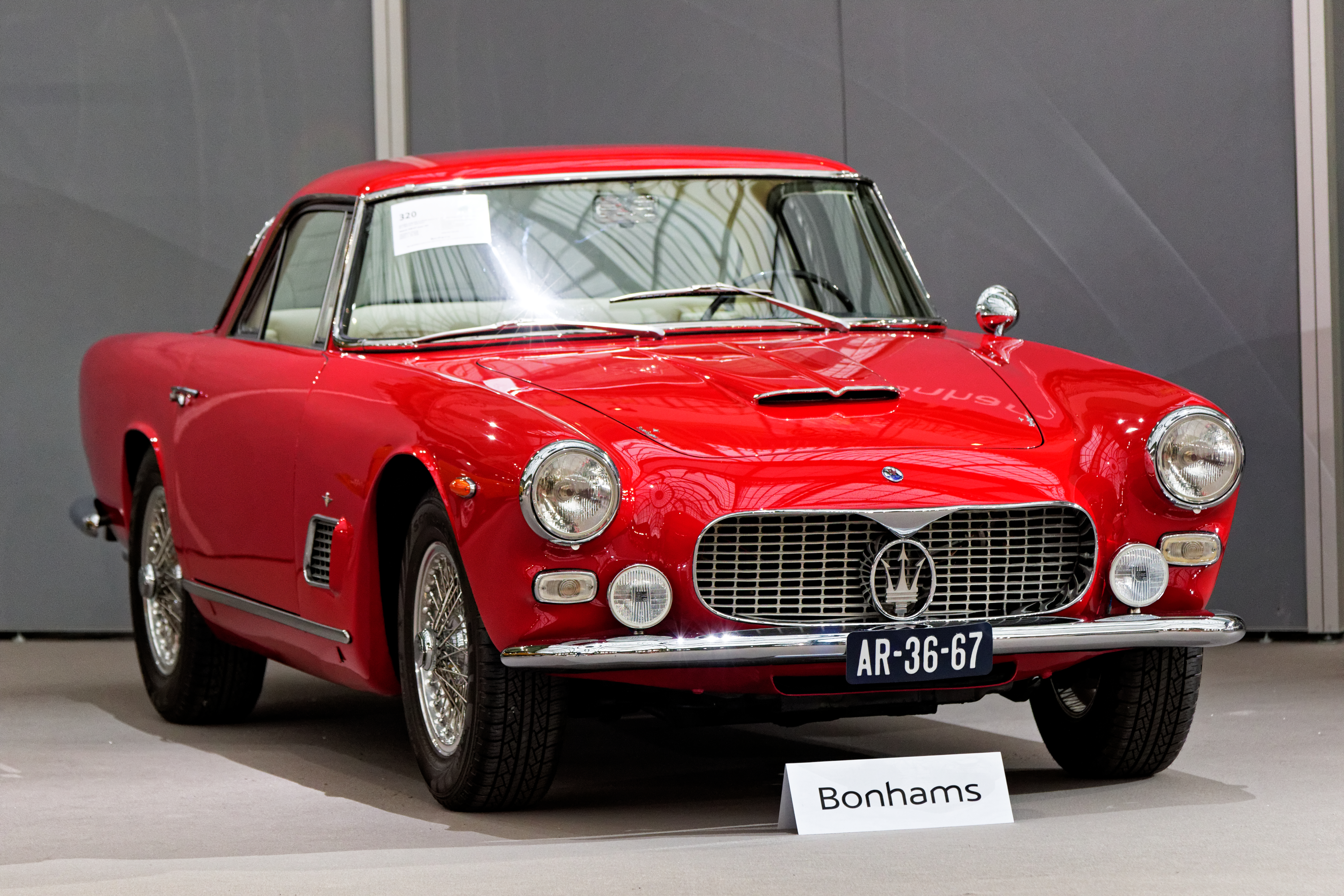 Un des véhicules présenté lors de la vente aux enchères Bonhams 2016 au Grand Palais de Paris.